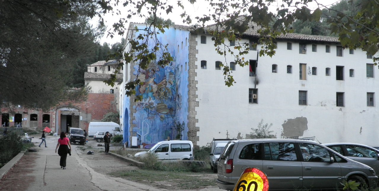 Vista de Ca la Fou (Colònia Industrial Postcapitalista a l'antiga colònia Marçal, Vallbona d'Anoia) des de l'accés pel camí. Octubre 2012.